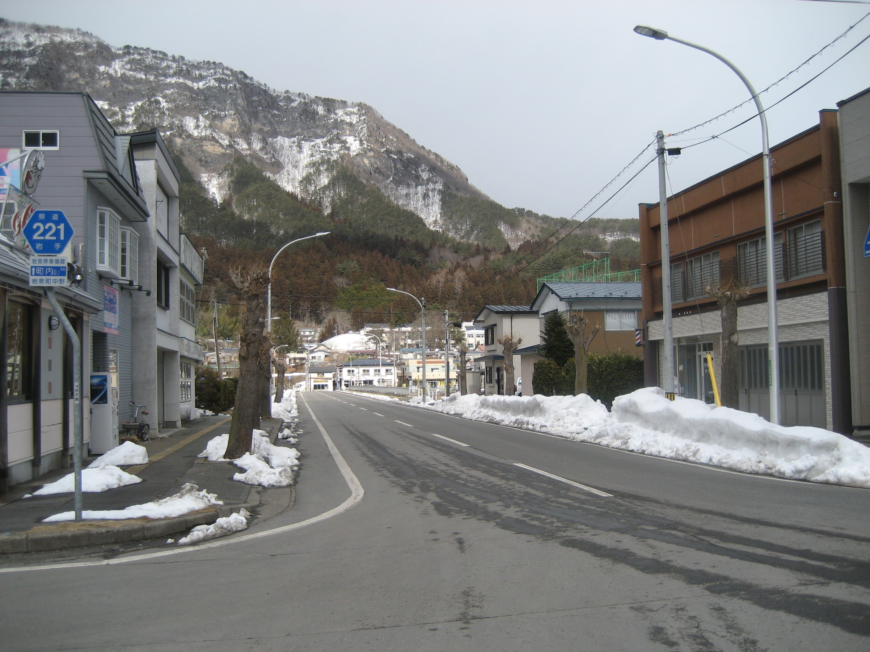 岩手県道221号線岩泉町岩泉駅前付近